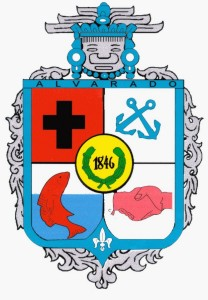 Este es el escudo del Puerto de Alvarado, Veracruz, Mexico